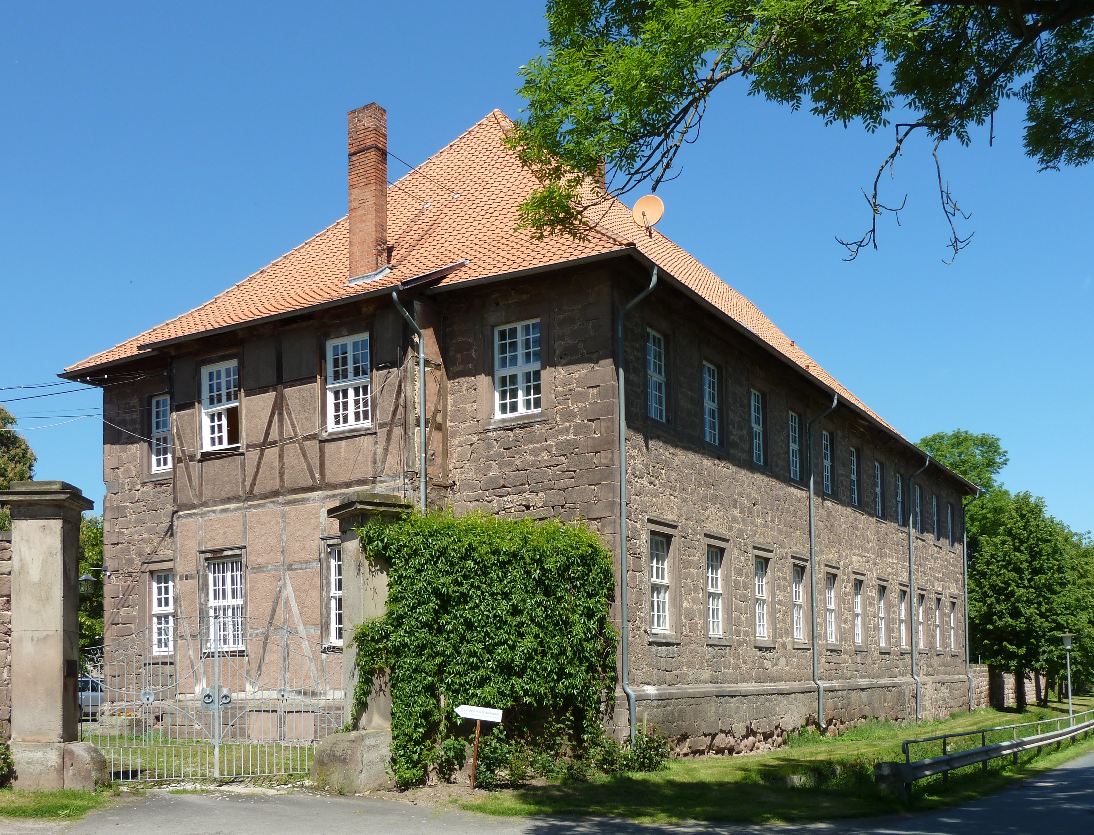 Herrenhaus des Ritterguts Niedergandern der Herren von Bodenhausen, errichtet 1698–1702. Bauherr: Cuno Ordomar von Bodenhausen. Ansicht von Südsüdosten